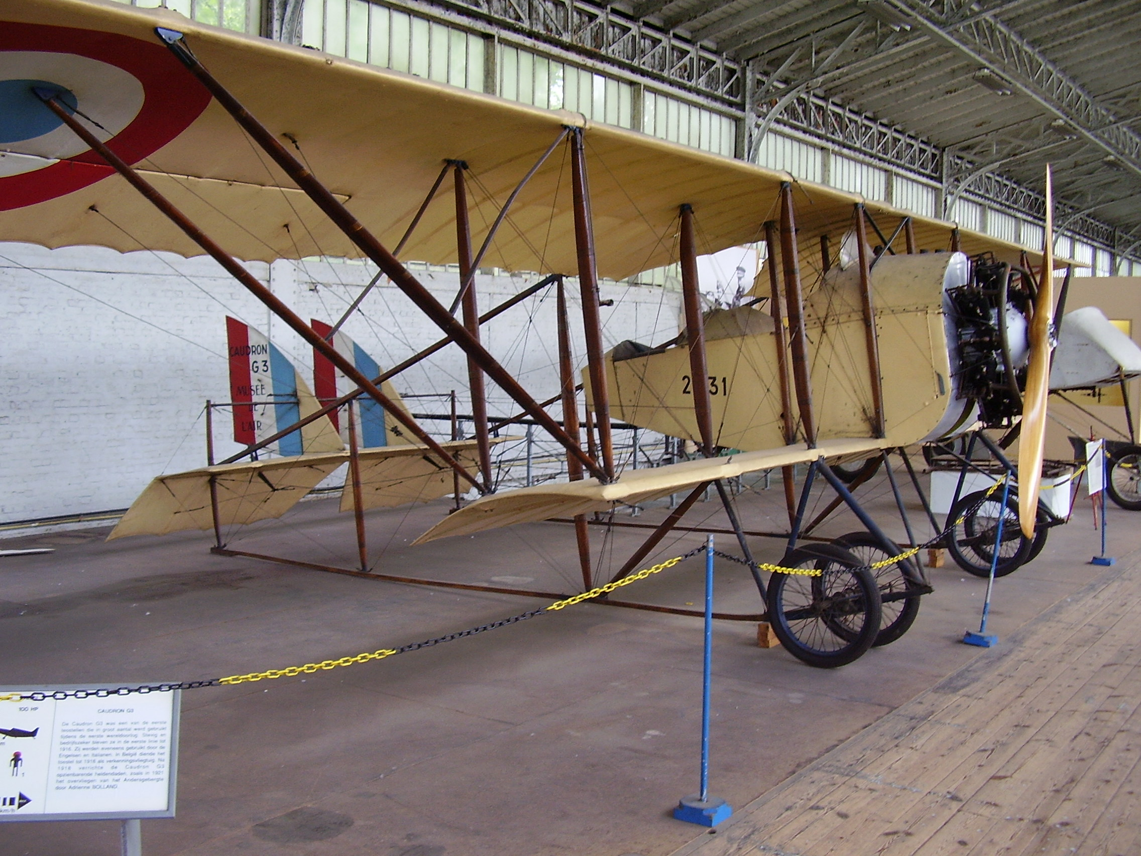 Royal Military Museum Brussels, Musée Royal de l'Armée, Koninklijk Museum van het Leger en de Krijgsgeschiedenis